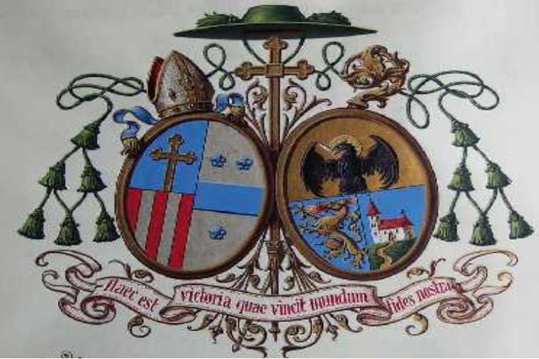 Wappen Johannes Evangelist Maria Gföllner (1867 - 1941) Bischof von Linz von 1915 bis 1941.